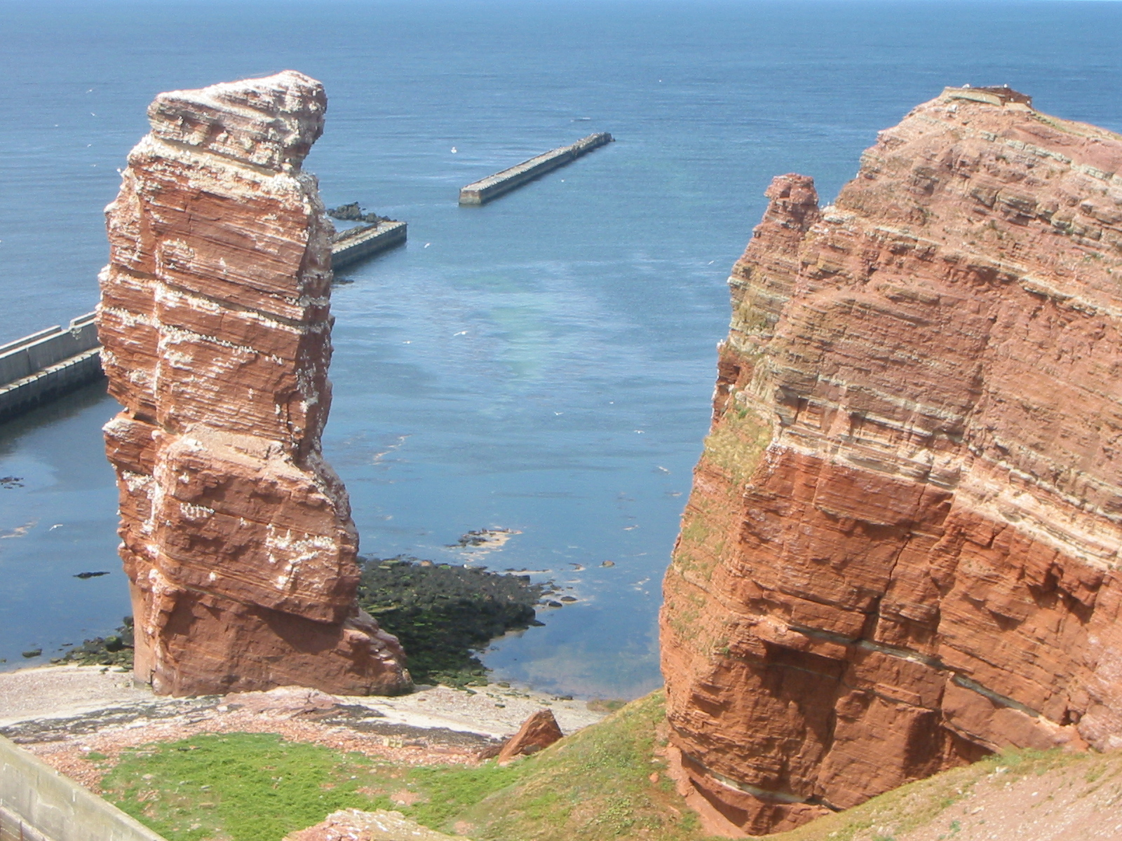 "Lange Anna", Heligoland